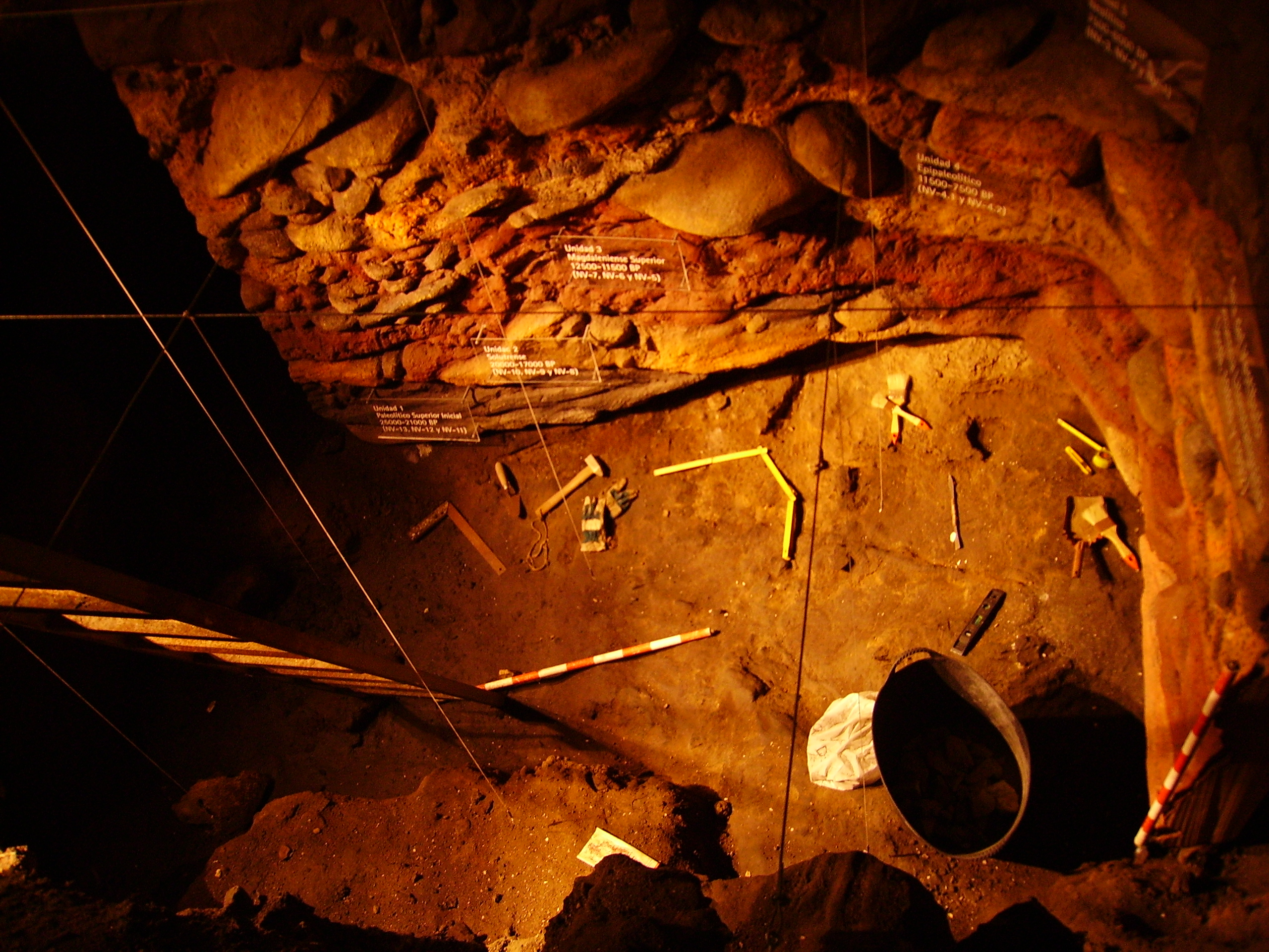 Cueva de Nerja